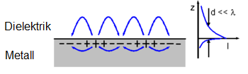 Elektrontiheduse pikkivonkumised